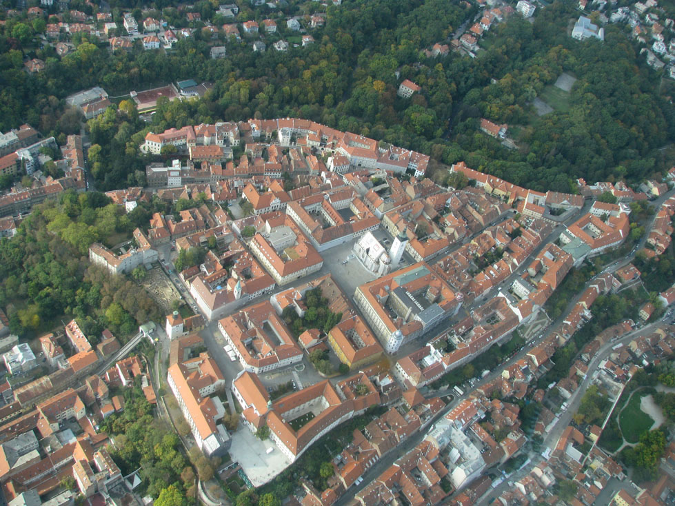 Zagreb Gornji grad iz aviona